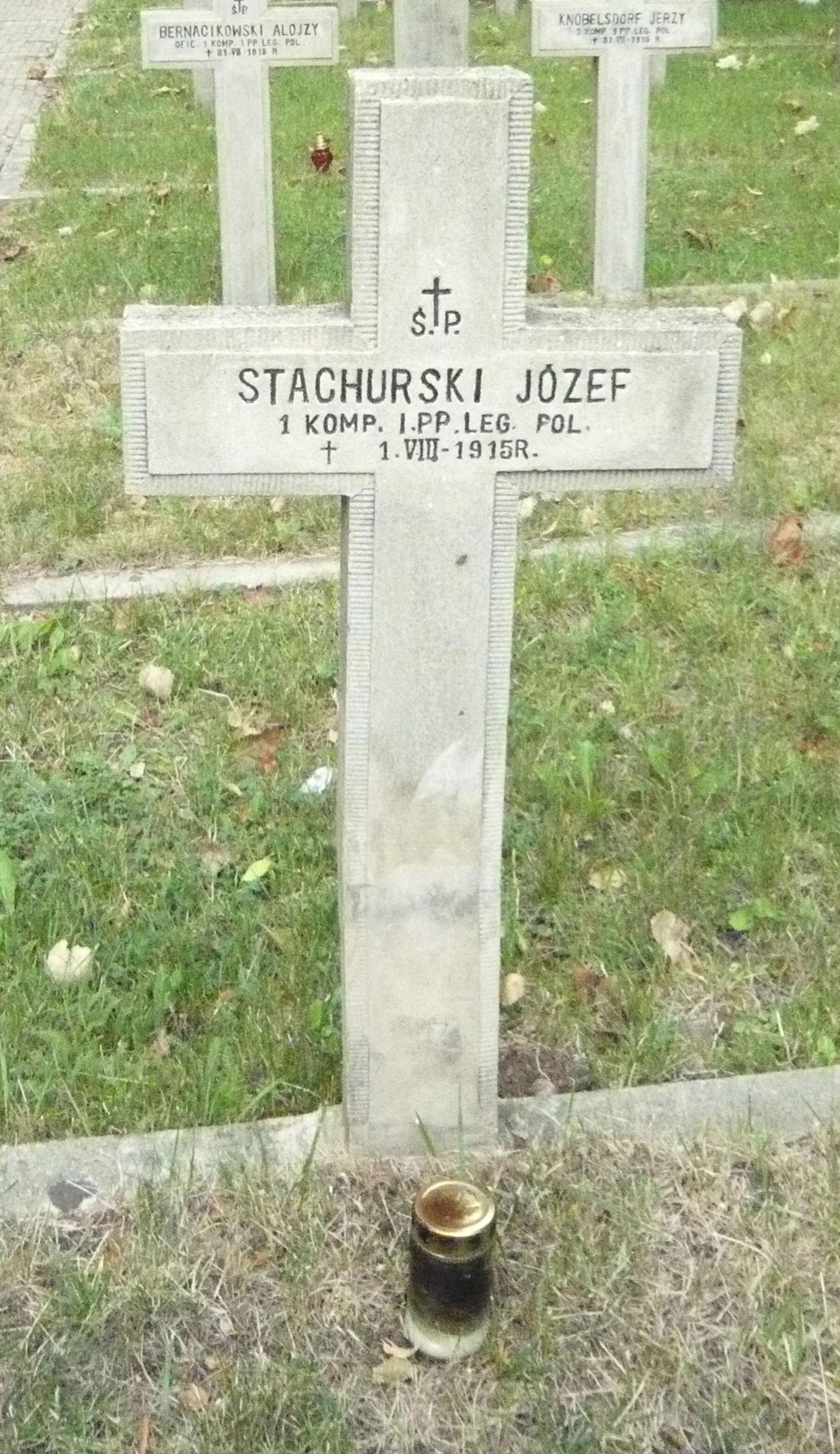 Grób Józefa Stachurskiego na Cmentarzu Legionistów w Jastkowie